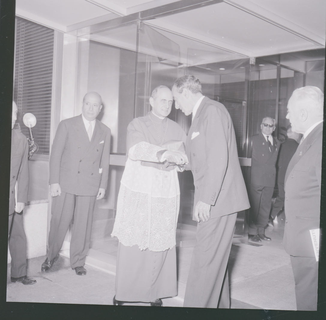 Servizio fotografico : Milano, 1962 / Paolo Monti. - Buste: 42, Fototipi: 43 : Negativo b/n, gelatina bromuro d'argento/ pellicola ; 6x6. - ((Serie costituita da 42 buste sciolte di negativi identificati con una doppia numerazione (da 44428 a 44470): 25159, 25160, 25161, 25162, 25163, 25164, 25165, 25166, 25167, 25168, 25169, 25170, 25171, 25172, 25173, 25175, 25176, 25177, 25178, 25179, 25180, 25181, 25182, 25183, 25184, 25185, 25186, 25187, 25188, 25189, 25190, 25191, 25192, 25193, 25194, 25195, 25196, 25197, 25198, 25199, 25200. - La busta identificata con il n. 25174 è vuota. - La suddetta serie è contenuta nella scatola G25001-25200, formato 18x24. - Nel 1962 la sede della compagnia fu spostata da Via Manzoni 38 a Corso Italia 23 all'angolo con via Santa Sofia. - Occasione: Documentazione dell'inaugurazione del nuovo edificio in Corso Italia 23 e per la pubblicazione: Notarnicola Vittorio (a cura di), "Benvenuti: Riunione Adriatica di Sicurtà", l'assicuratrice italiana, Milano, Amilcare Pizzi, 1962. - Fonte: Rubrica di Paolo Monti: Archivio fino 1-4-1961/ 31-3-1963 (1961-1963), presso Archivio Paolo Monti. - Fonte: Monografia di Notarnicola, Vittorio (a cura di): Benvenuti: Riunione Adriatica di Sicurtà, l'assicuratrice taliana, Milano, Amilcare Pizzi (1962/05/09). Grafica di Albe Steiner